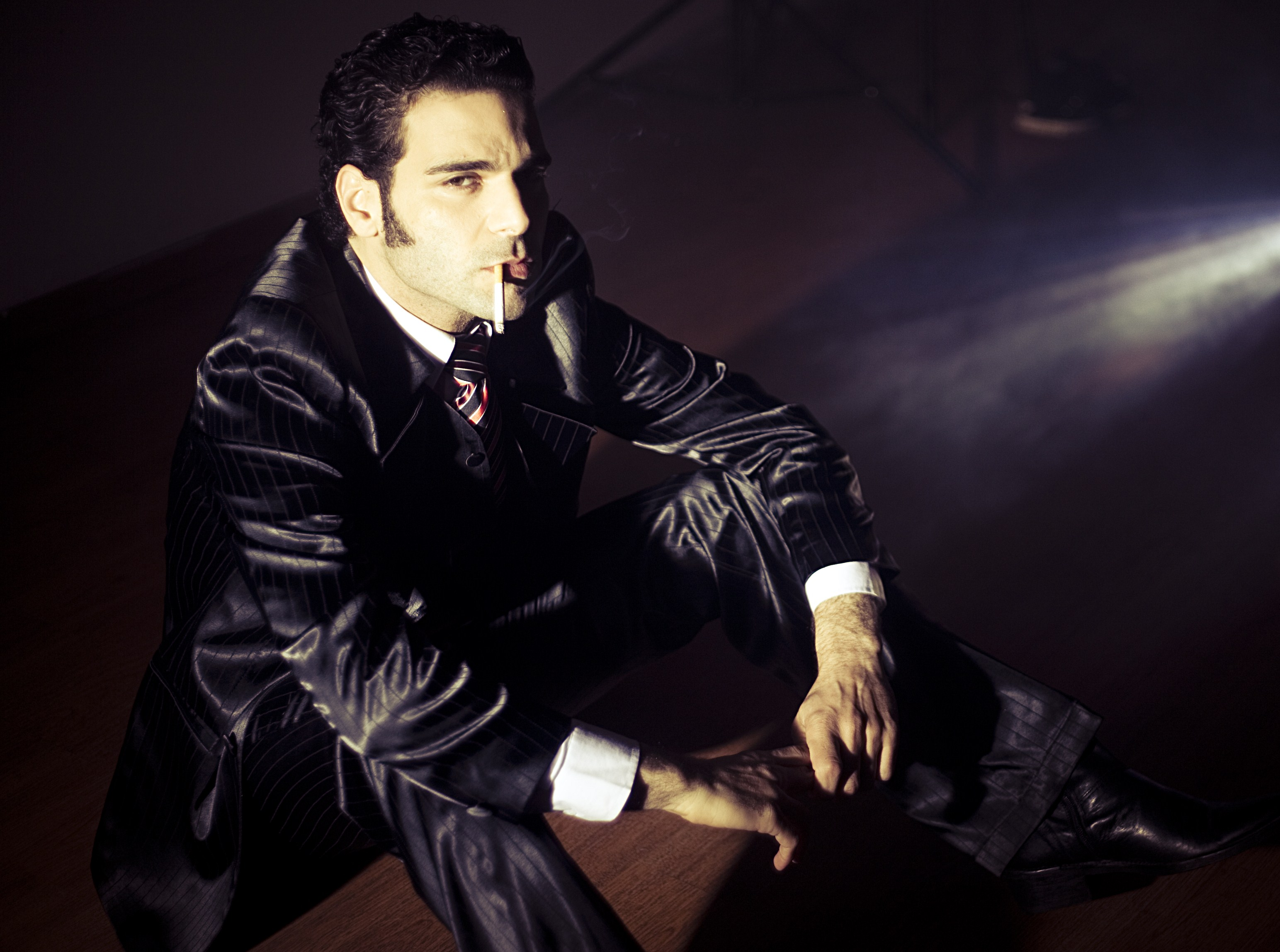 ציון אשכנזי